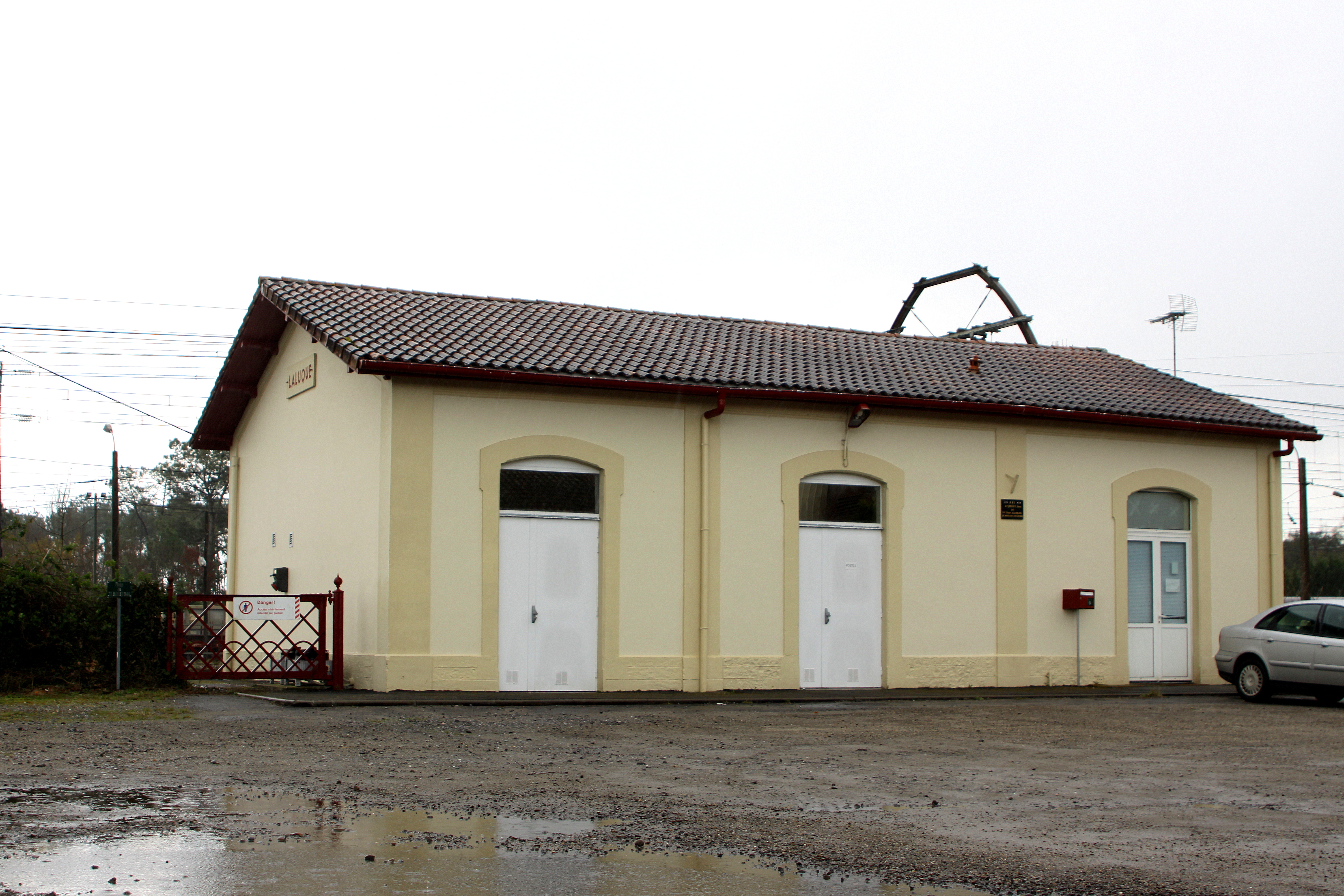 Gare de Laluque (Landes, France)